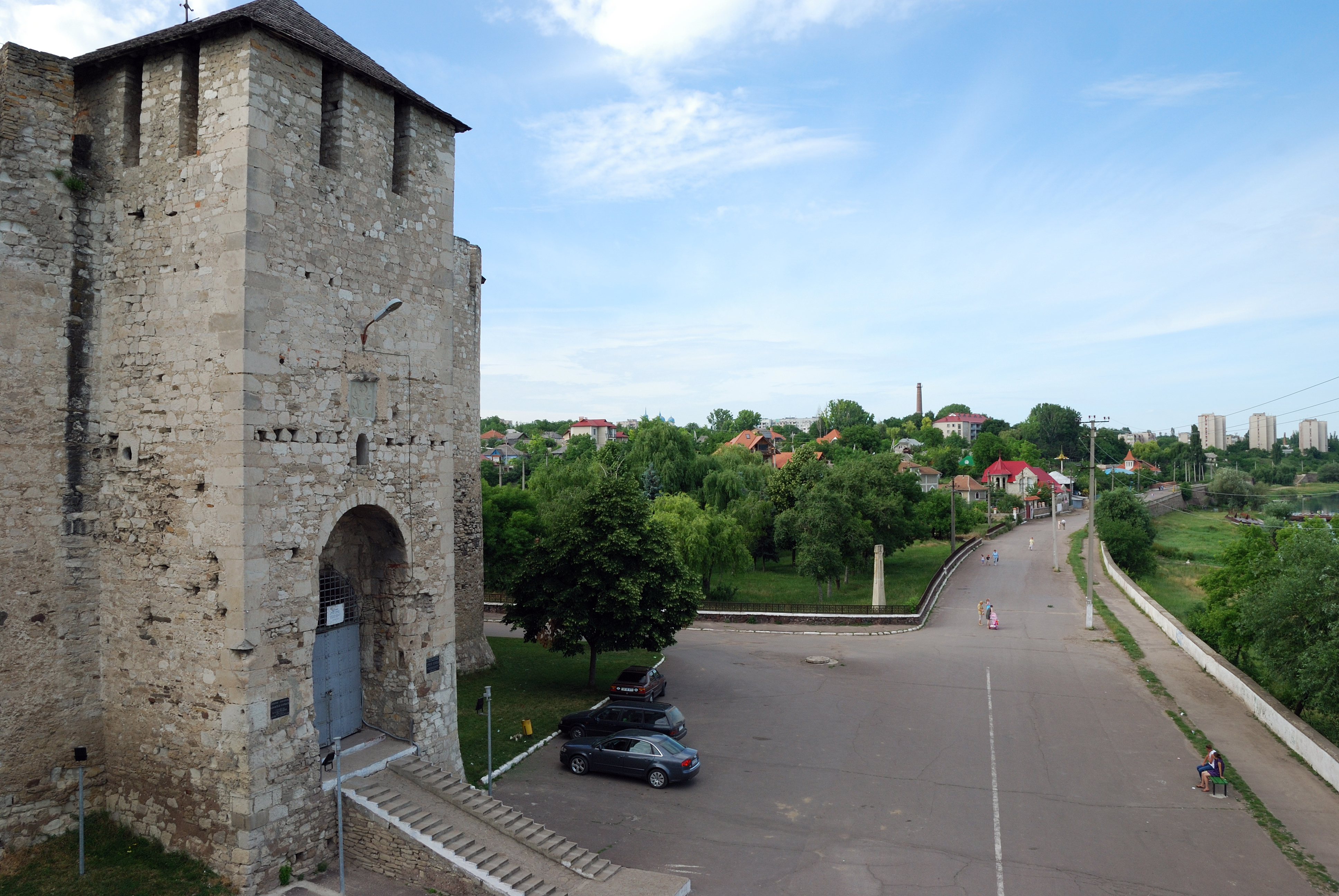 Fortăreaţa din Soroca se evidenţiază dintre celelalte cetăţi româneşti, prin faptul că intrarea principală este păzită de către flancuri, are un sistem concentric de apărare, iar rotunjimea o aduce aproape de perfecţiune.